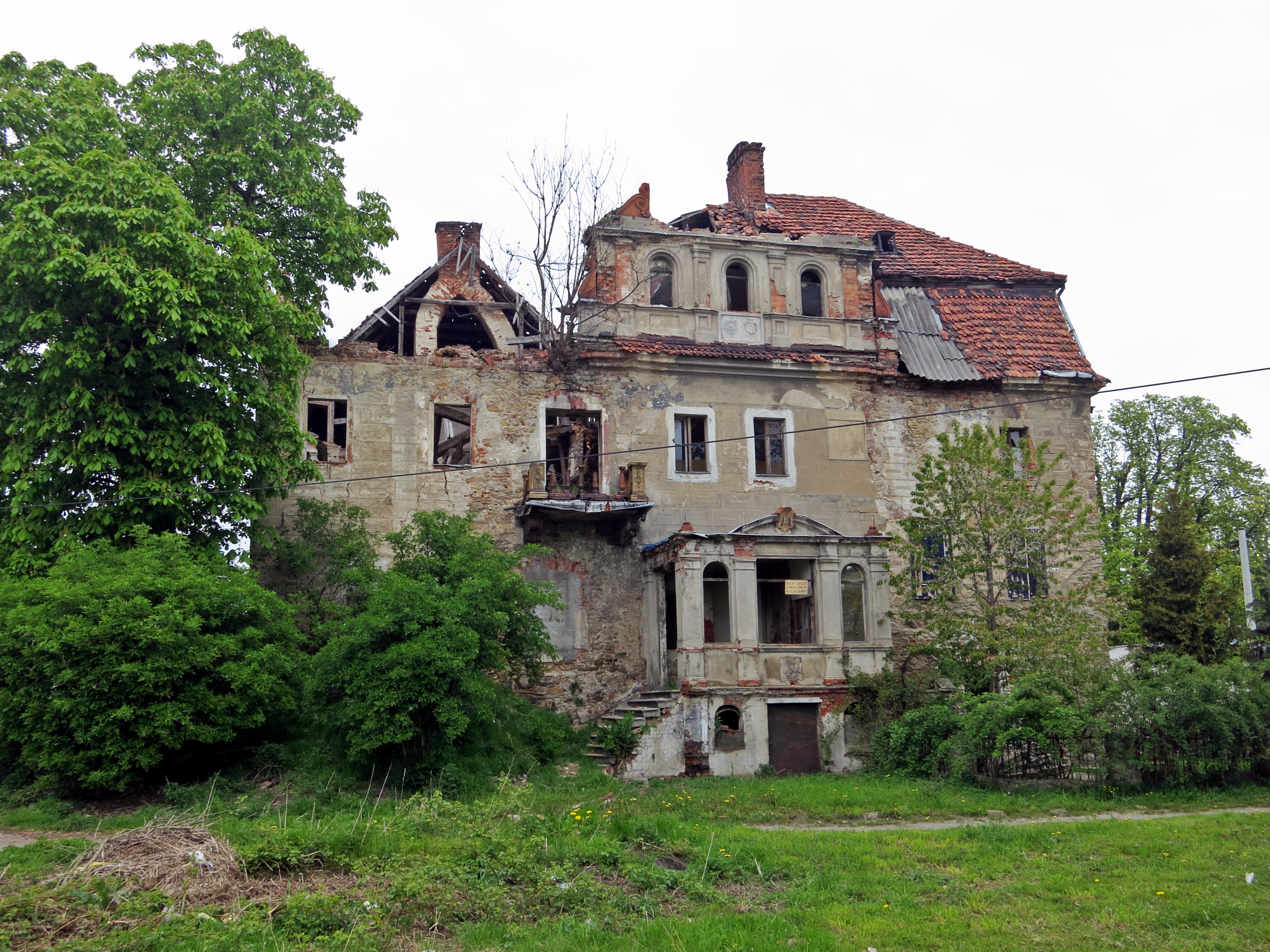 Gogołów, pałac, XVI, XIX